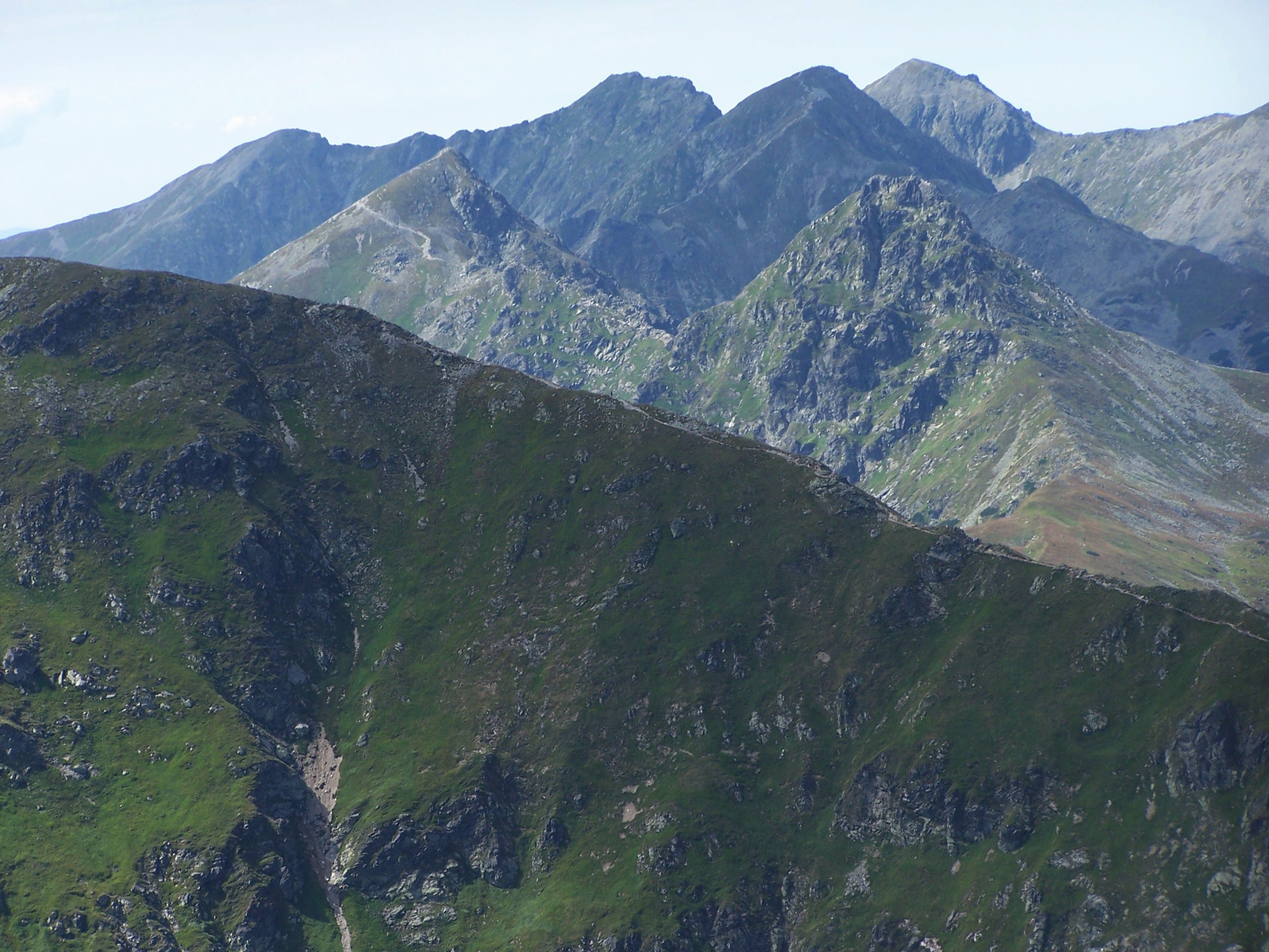 West Tatra Mountains (Łopata, Płaczliwy Rohacz, Ostry Rohacz, Pachola)